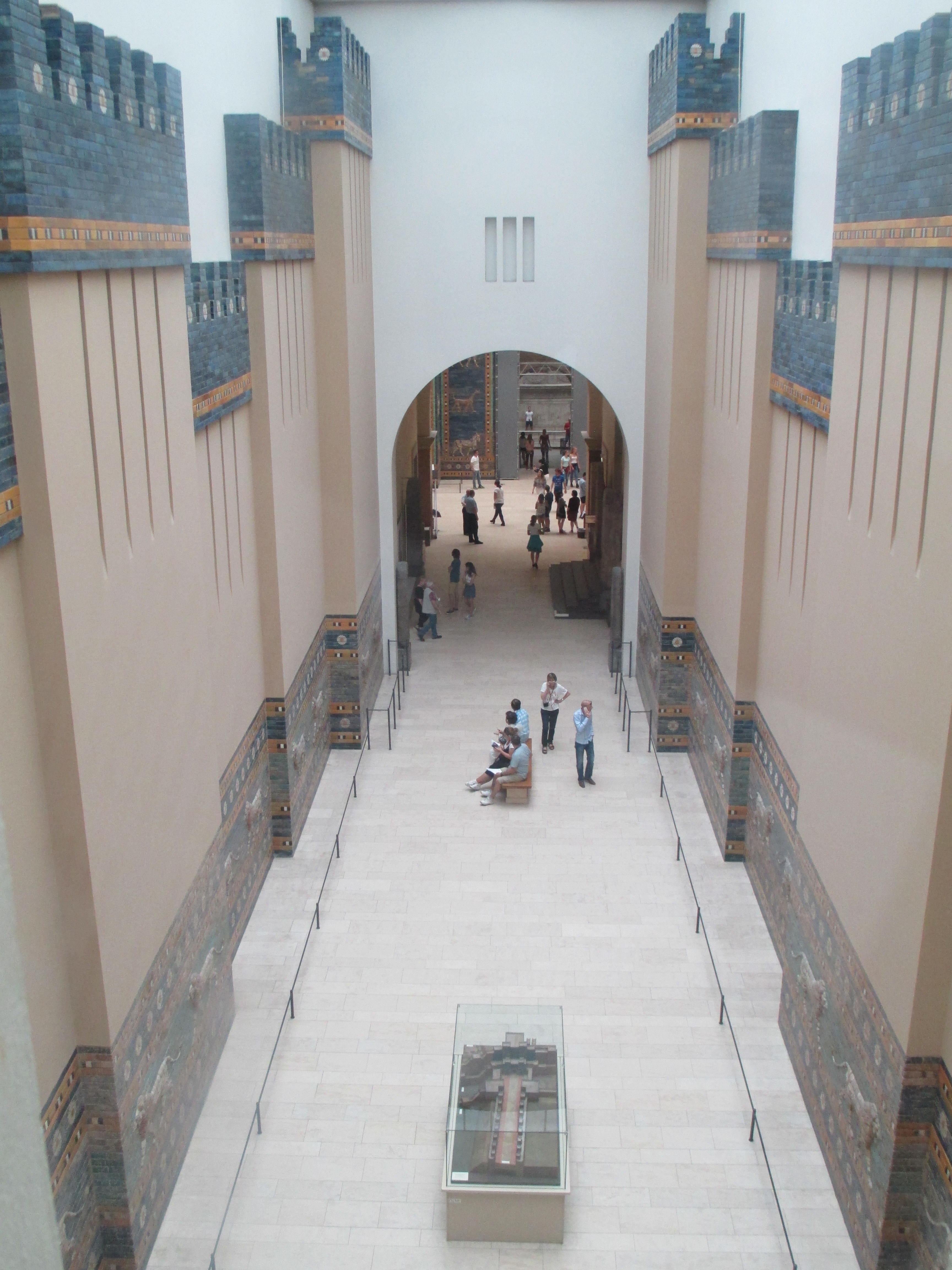 רחוב התהלוכות של בבל במוזיאון פרגמון